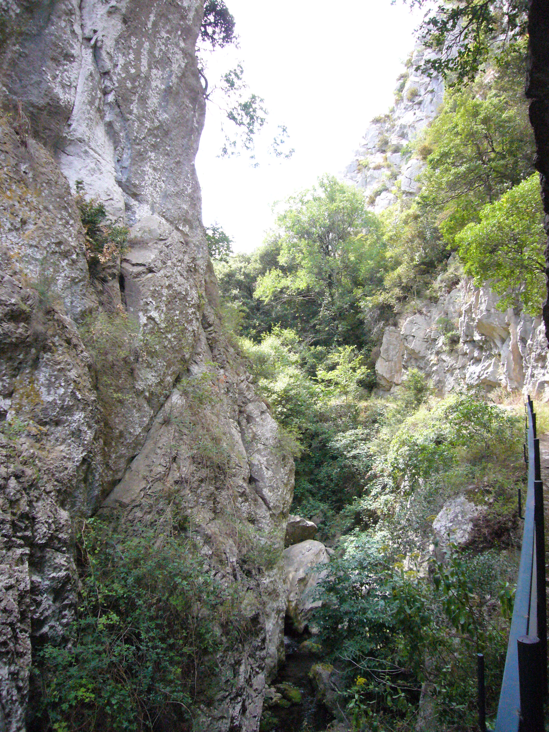 Les gorges de Saint-Jaume, à Fenouillet (66, France)